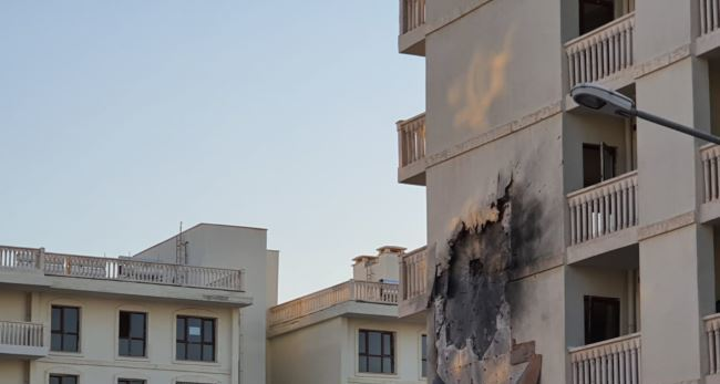 Barış Pınarı Hârekatı sonrası Nusaybin'deki bir binaya isabet eden roketin yarattığı hasar.